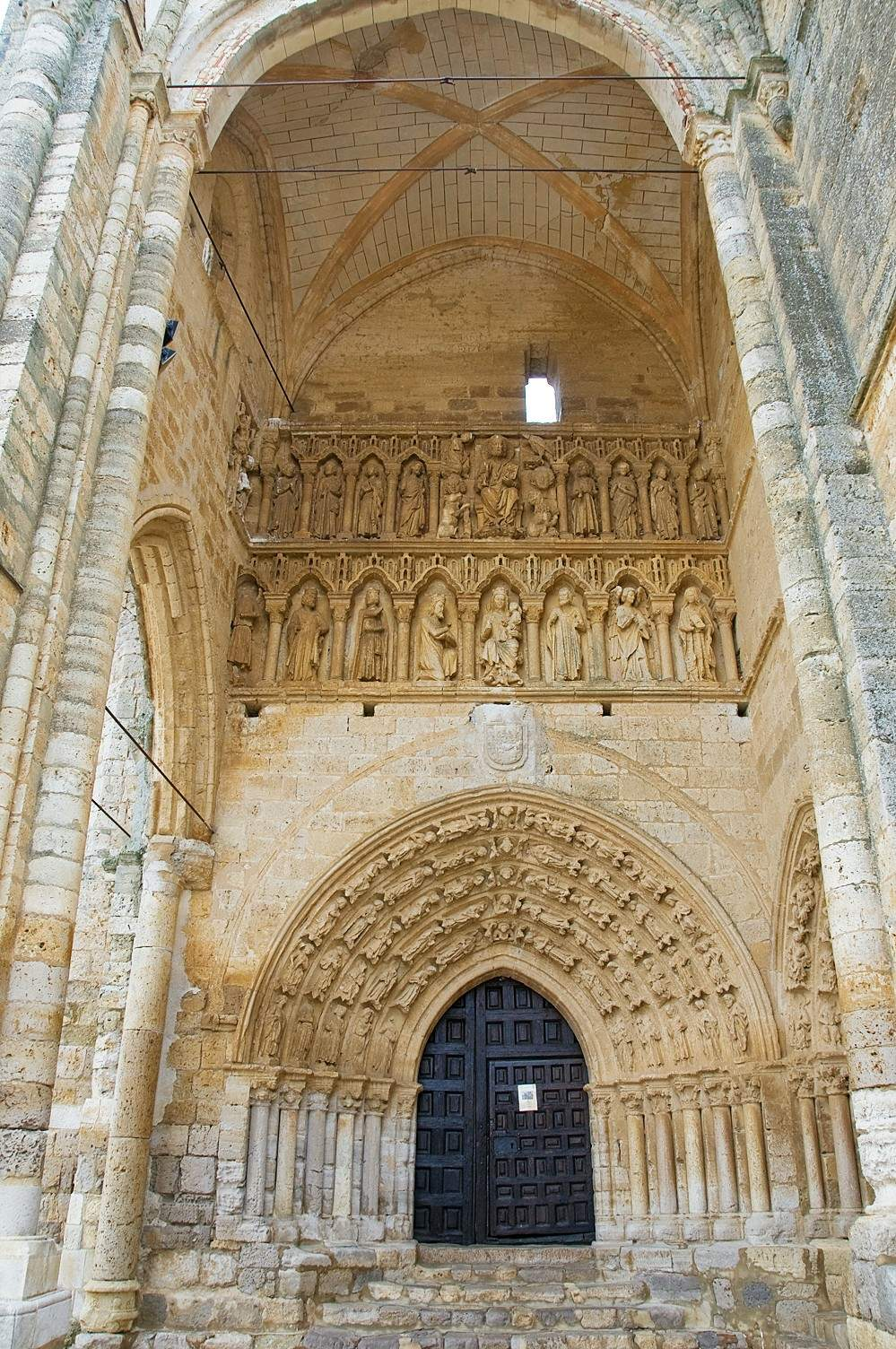 Iglesia de Villalcázar de Sirga en Palencia